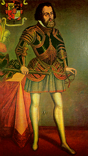 Hernán Cortés mit katalanischer Markierungsfahne